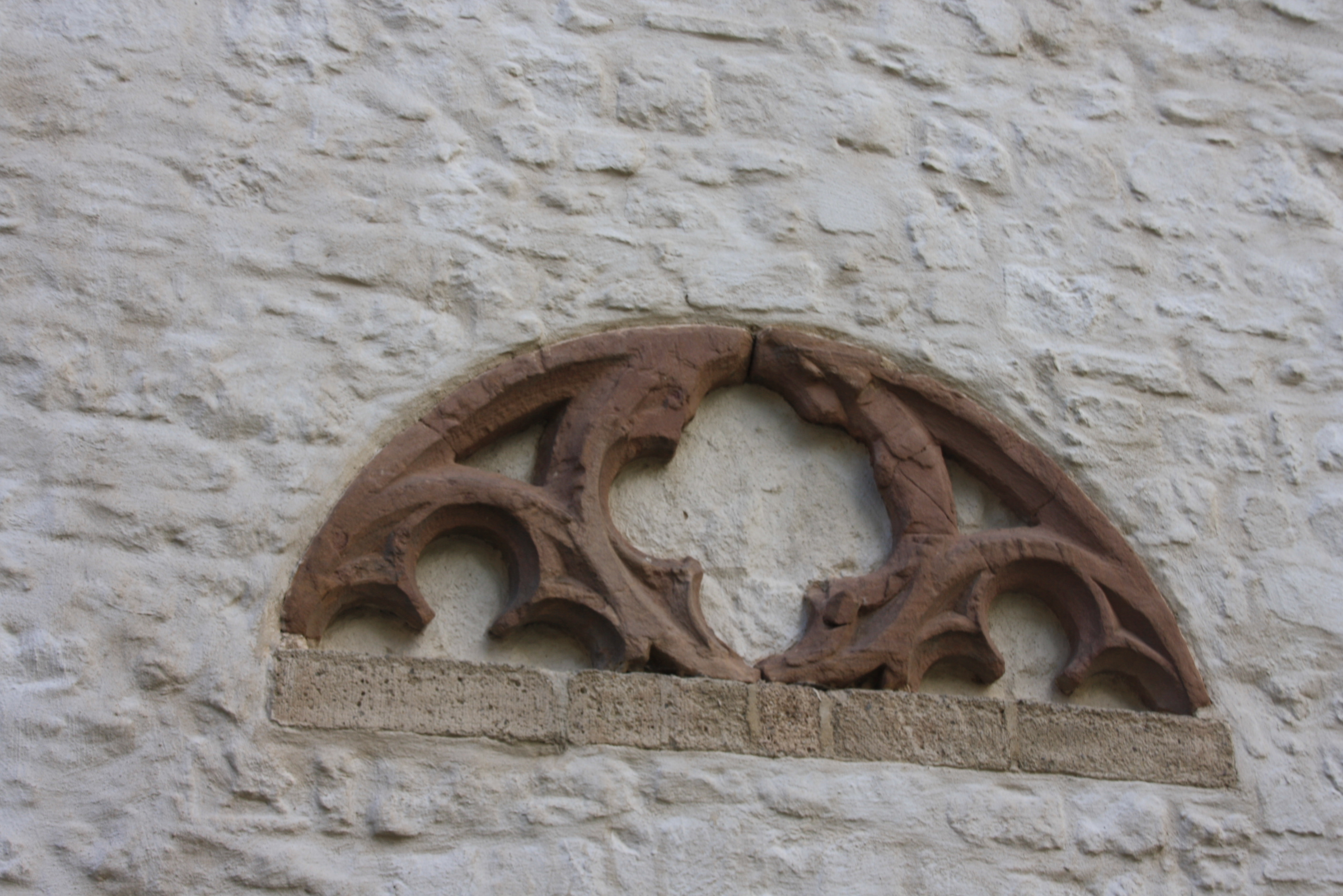 Die Kirche St. Viktor in Hochkirchen